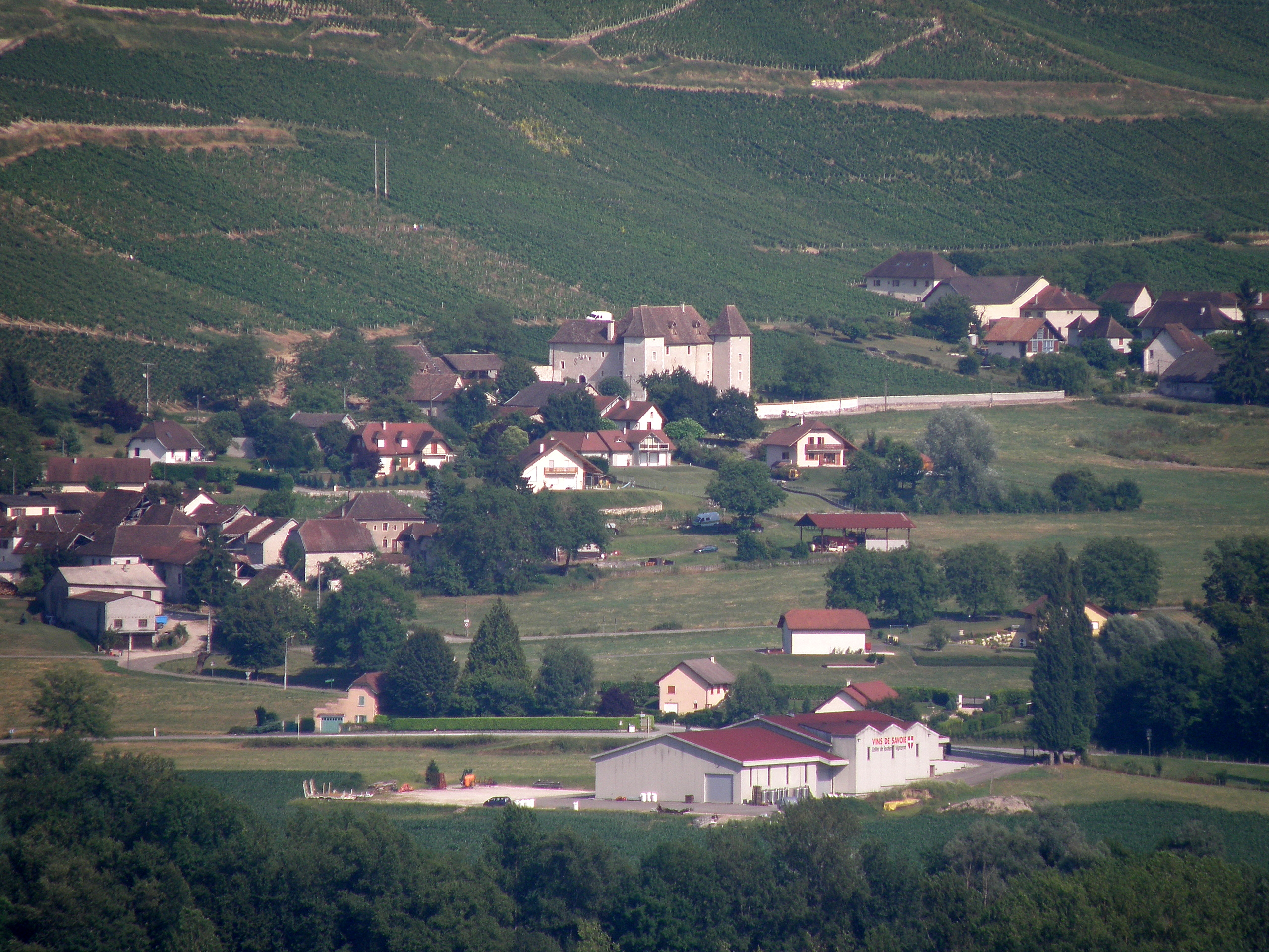 Jongieux, comm. du départ. de la Savoie (région Rhône-Alpes, France). Vue générale. Photo prise depuis la D37 aux alentours de Sillins (comm. de Massignieu-de-Rives). Nous regardons vers l'est-sud-est.